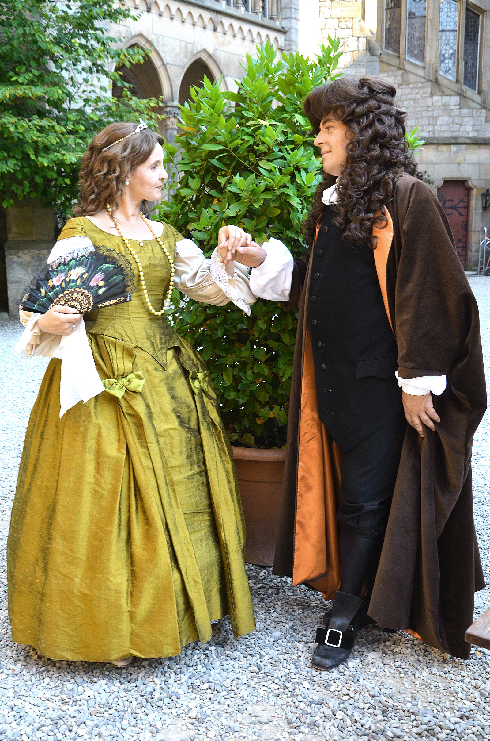 Darsteller der Theaterführung "Wenn die Sophie mit dem Genie ..." auf Schloss Marienburg: Die Logopädin und Schauspielerin Tatjana Pohl als Kurfürstin Sophie sowie der Opernsänger und Schauspieler Jan Kristof Schliep in seiner Rolle als das Universalgenie Gottfried Wilhelm Leibniz ...